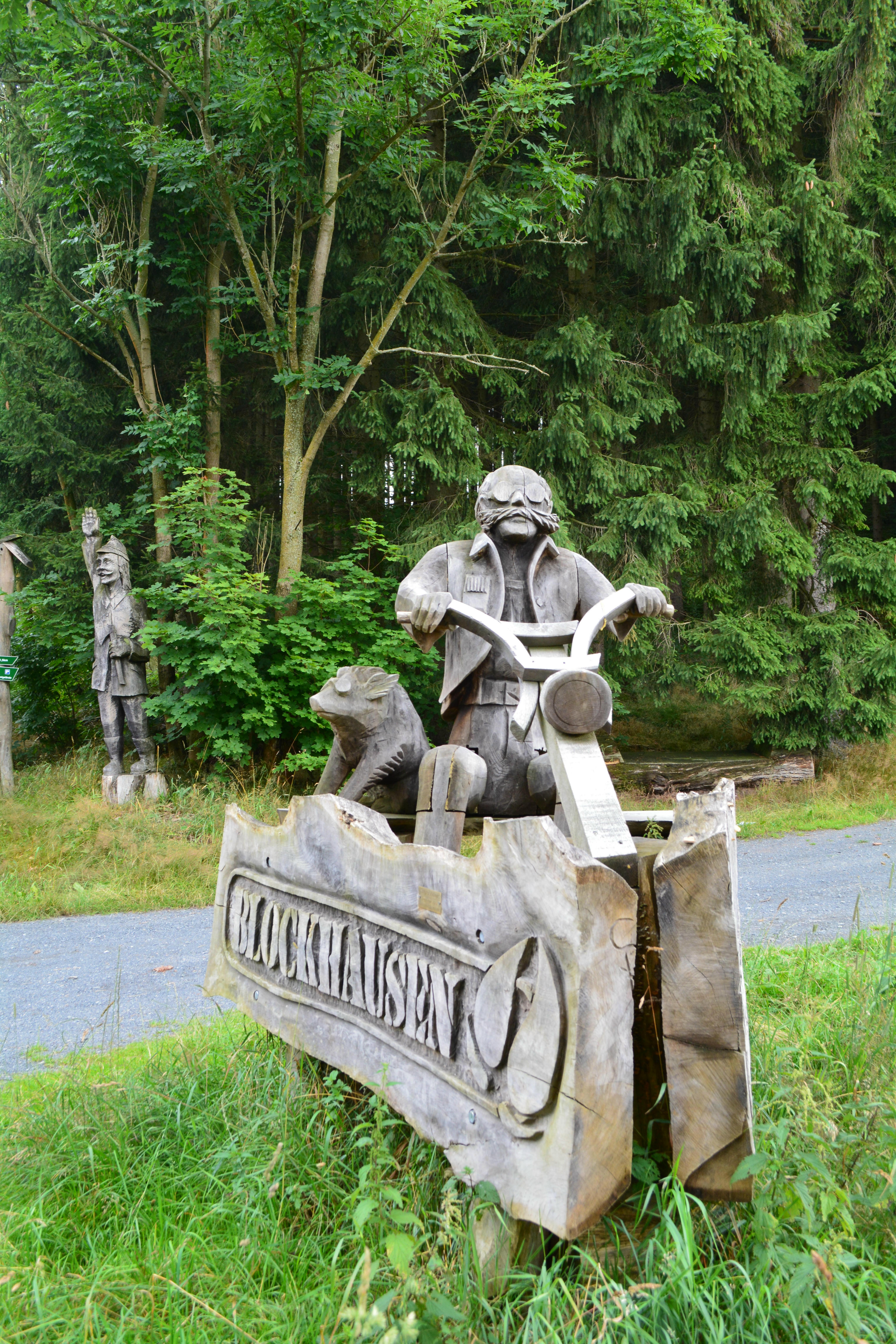 Blockhausen: Kettensägen-Schnitzen, diverse Figuren